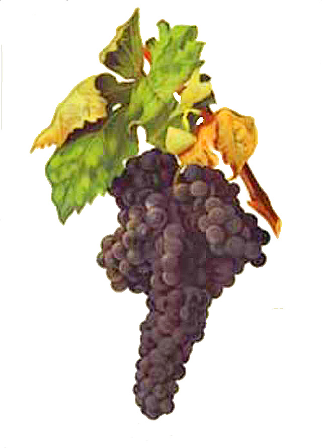 Grappe de Tempranillo par Viala et Vermorel